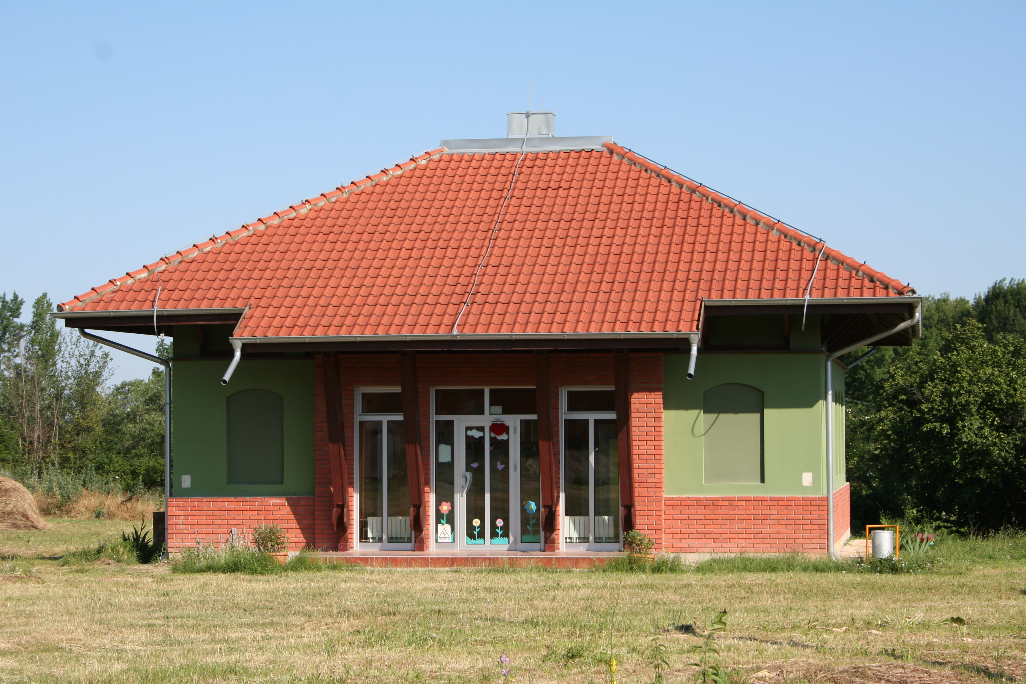 Seoska škola, Miokus